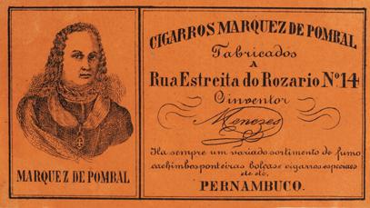 Rótulo de cigarro. Cigarros Marquês do Pombal. A coleção Brito Alves é composta de 1.252 rótulos de cigarros na técnica litográfica. Foi iniciada pelo comerciante Vicente de Brito Alves e continuada pelo seu filho, o advogado pernambucano José de Brito Alves (1887-1963). Em 1964 a coleção foi doada pela família ao então Instituto Joaquim Nabuco de Pesquisas Sociais. Constitui-se em um raro e valioso patrimônio cultural e artístico, registrando fatos históricos, usos, costumes e aspectos da vida cultural da sociedade brasileira e particularmente da pernambucana, no final do século XIX até as primeiras décadas do século XX.